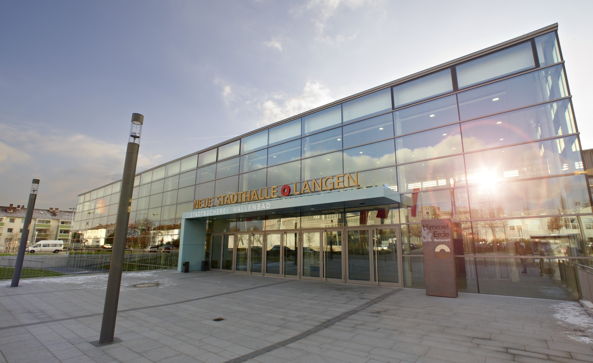 Glasfassade der Neuen Stadthalle in Langen (Hessen)